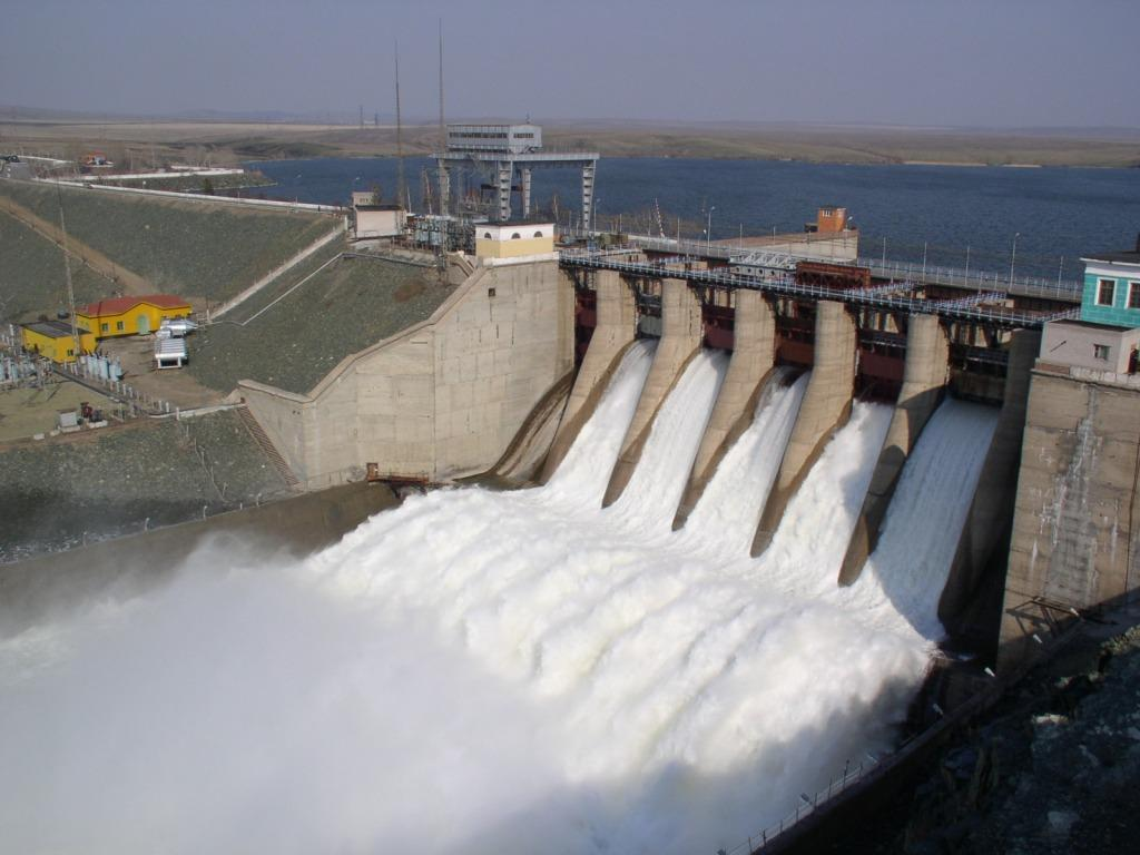 Комплекс гидросооружений Ириклинского водохранилища в половодье 2004 г.